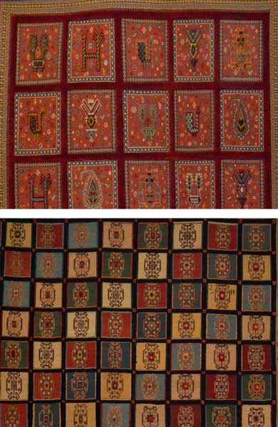 قابی - خشتی طرح فرش